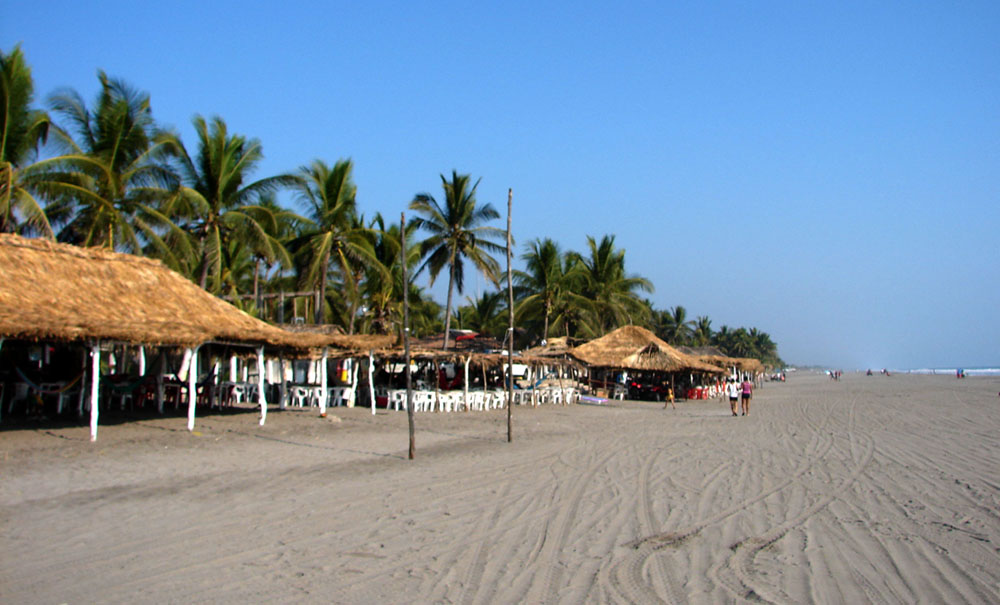 Strand von Puerto Arista (Chiapas, Mexico)